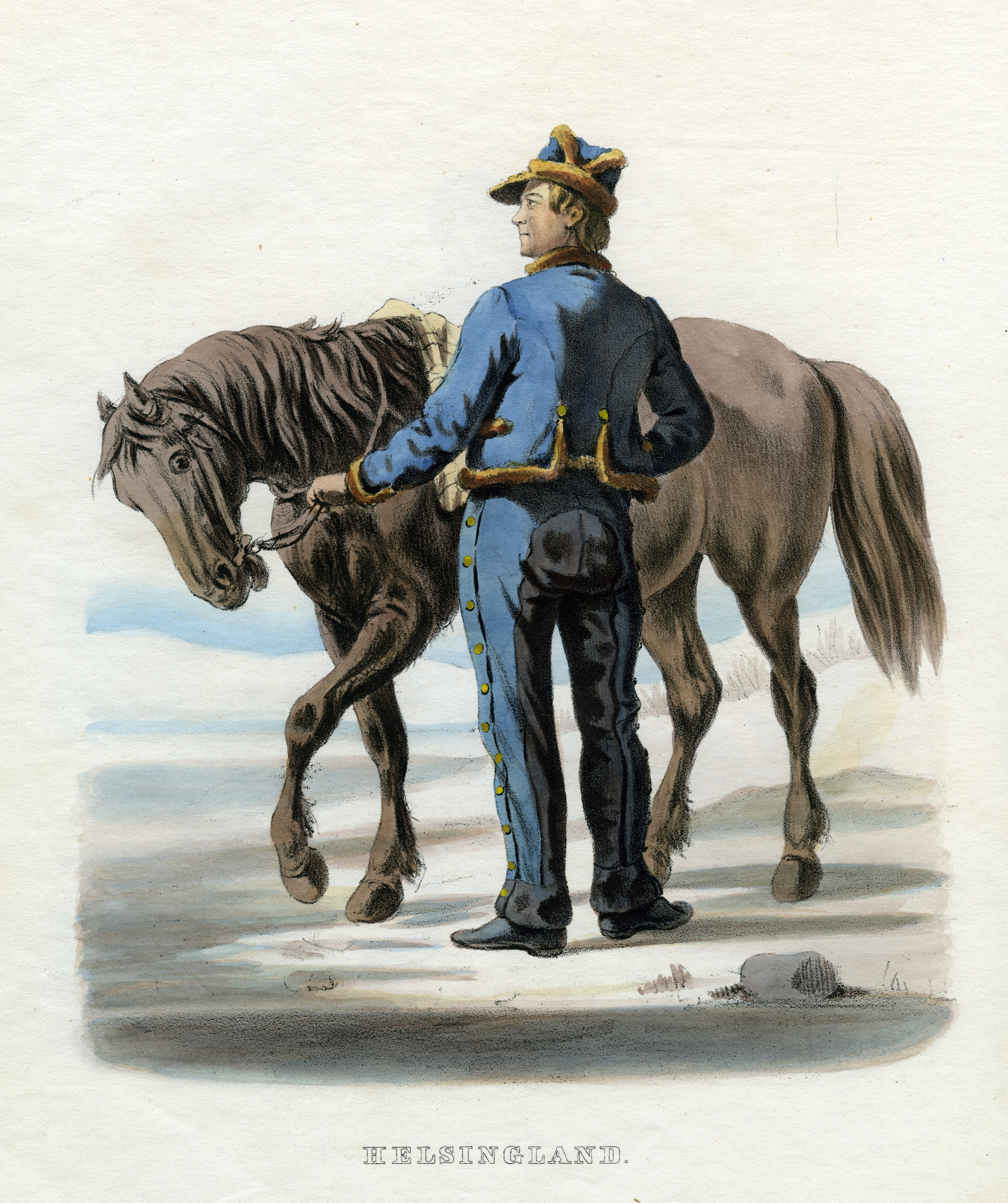 Folkdräkt från Hälsingland, Sverige. Plansch ur Svenska folkets seder, bruk och klädedrägter (1863) tecknad av Carl Anders Dahlström.